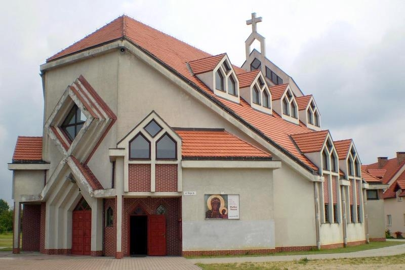 Kościół w Gubinie